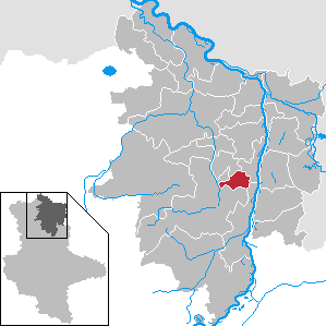 Hassel im Landkreis Stendal, Sachsen-Anhalt